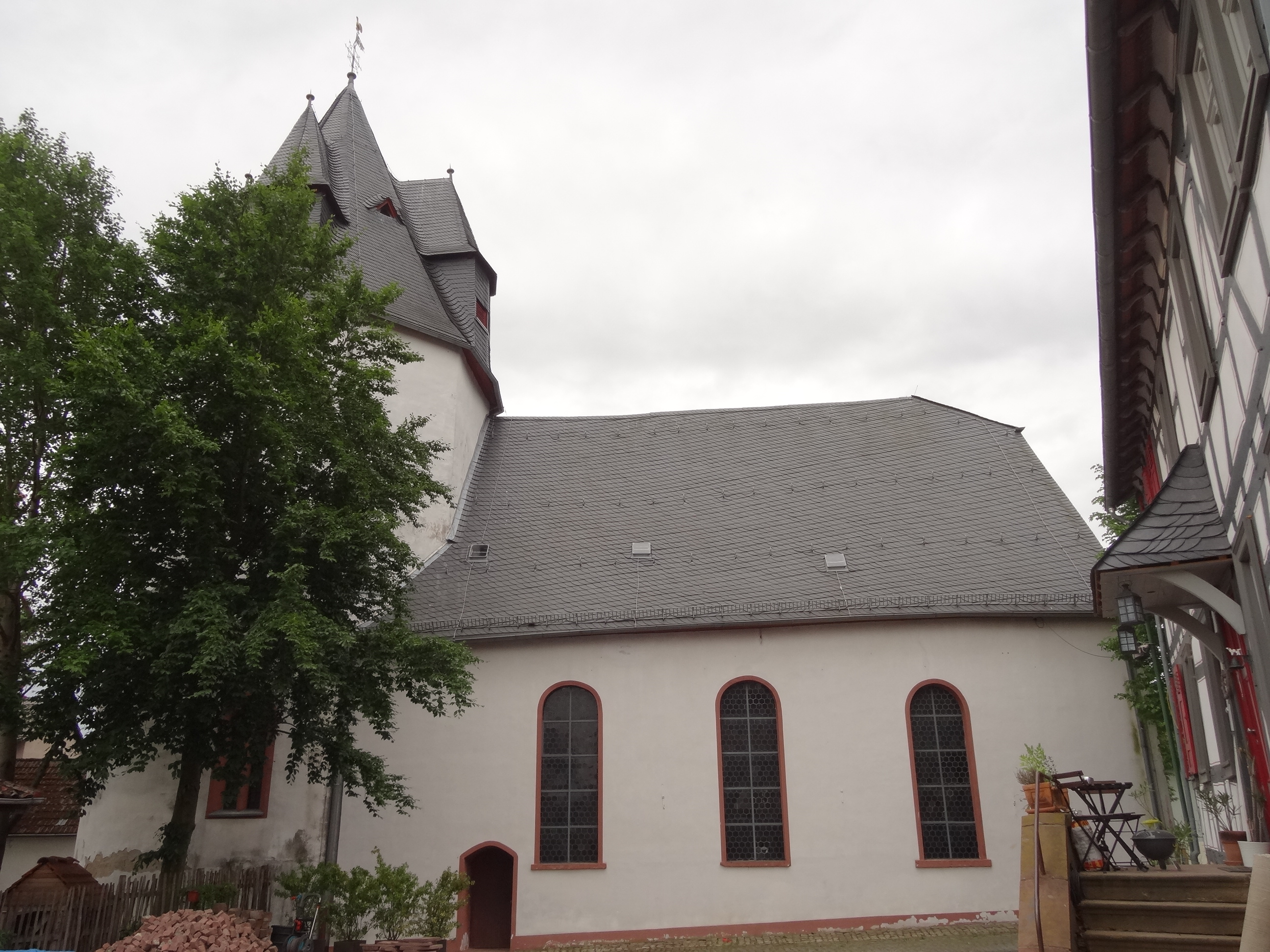 Evangelische Pfarrkirche (Hoch-Weisel)